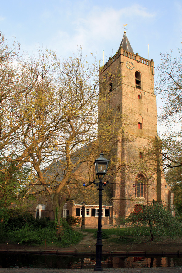 Nederlands Hervormde Kerk, Ring 2 Dirksland 16e eeuw Rijksmonument nr: 10260 Ned. Herv. Kerk. Laat-gotische met houten tongewelven overdekte dorpskerk, bestaande uit een vijfzijdig gesloten, eenbeukig koor, een driebeukig, pseudo- basilicaal schip op zuilen met koolbladkapitelen en een eenvoudige toren met korte, achthoekige spits.